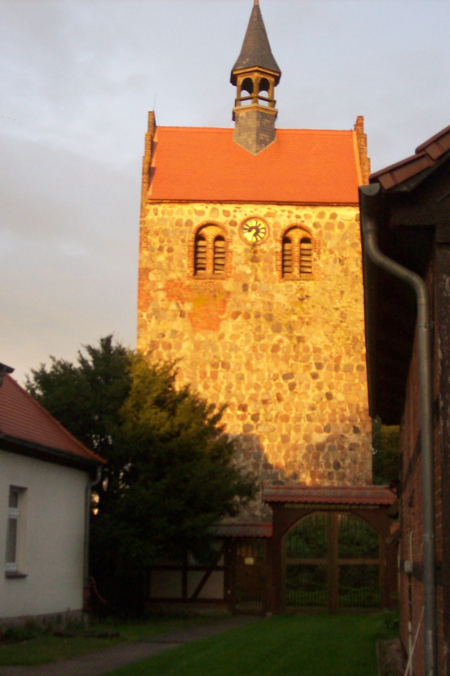 Kirche in Neulingen, Ortsteil von Arendsee (Altmark). Die Kirche wurde 1915 restauriert.